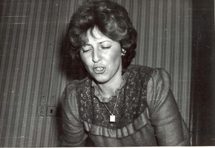 SOU-E Opatovice